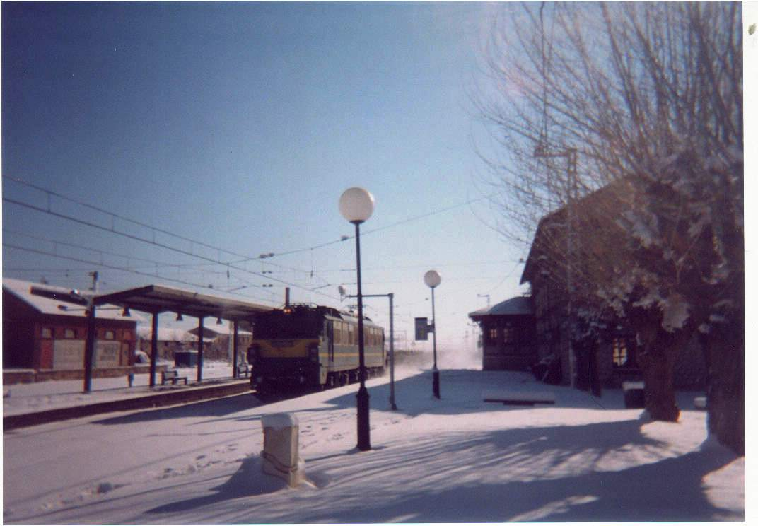 Una locomotora de la serie 251 de Renfe Operadora, en la estación de Sahagún.